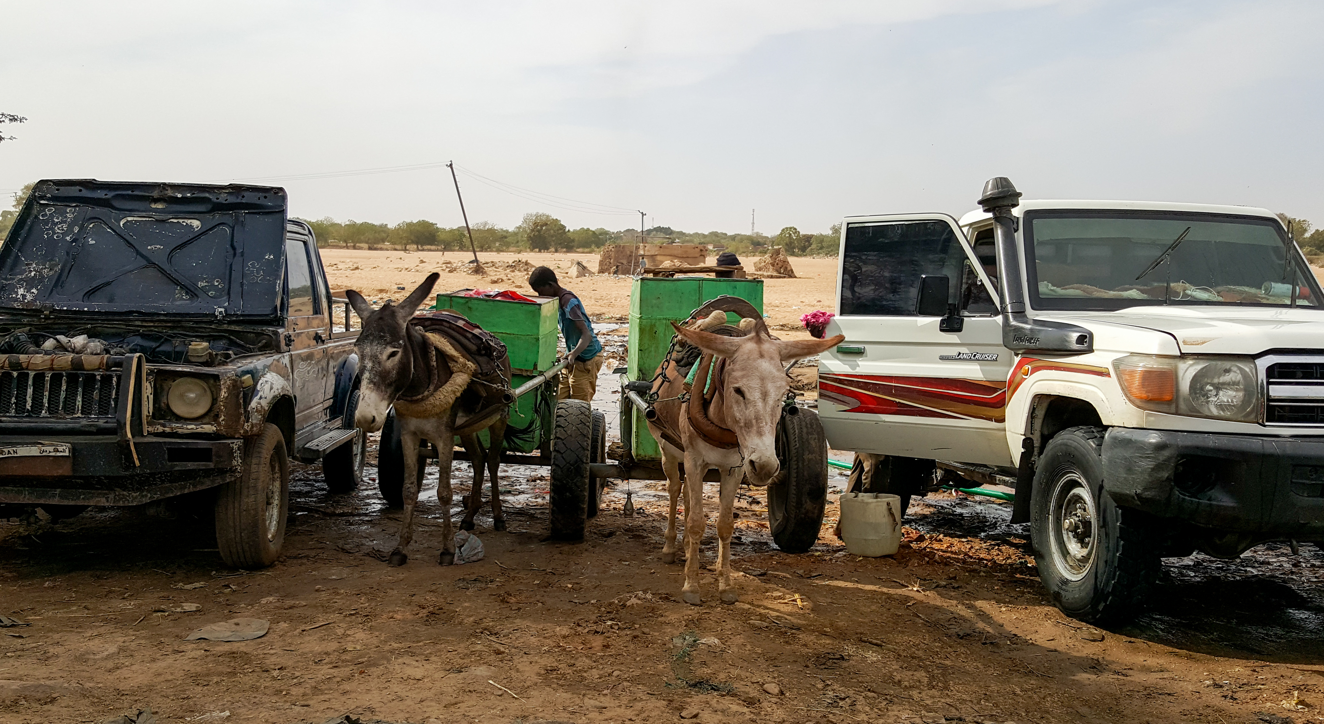 WLASudan2020 This is an image with the theme "Africa on the Move or Transport" from: Sudan